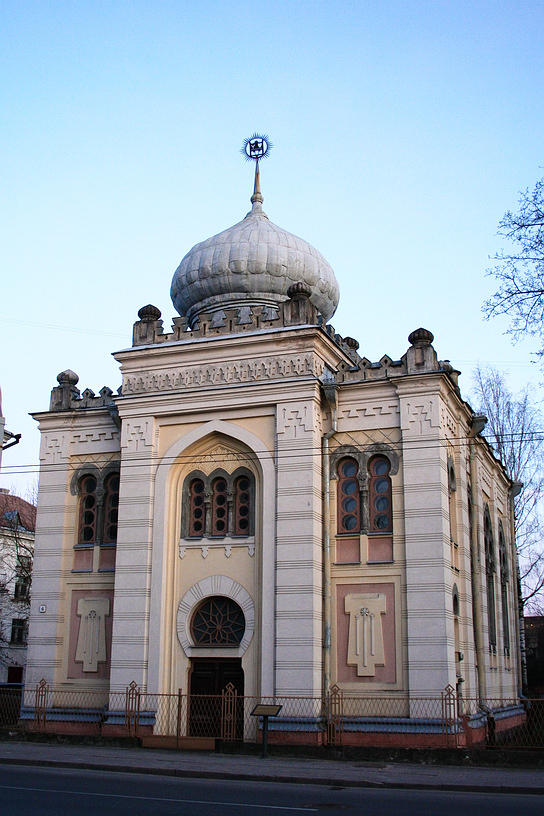 Karaite kenesa in Vilnius, Lithuania